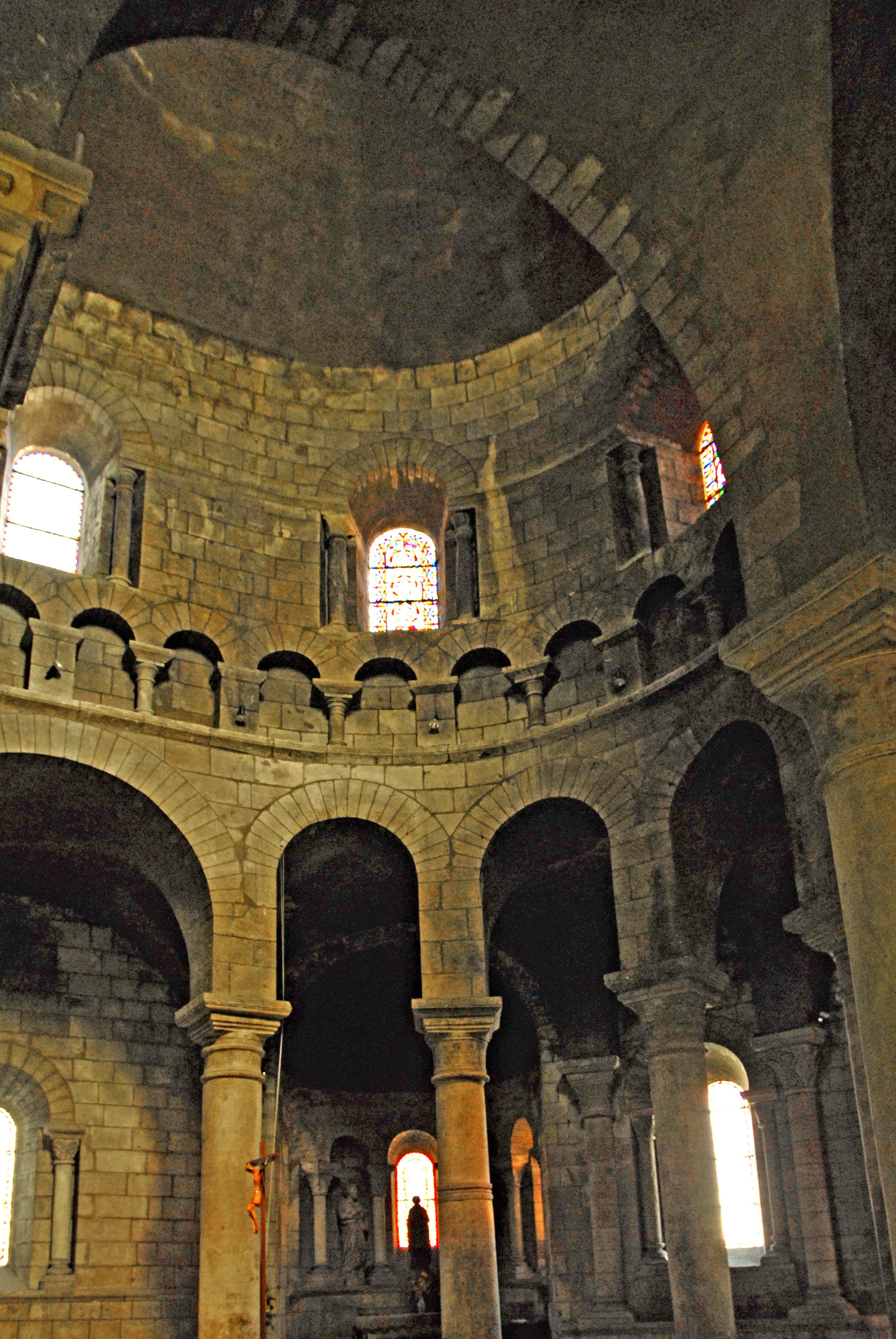 St.-Etienne Nevers, Chor aus südl. Umgang